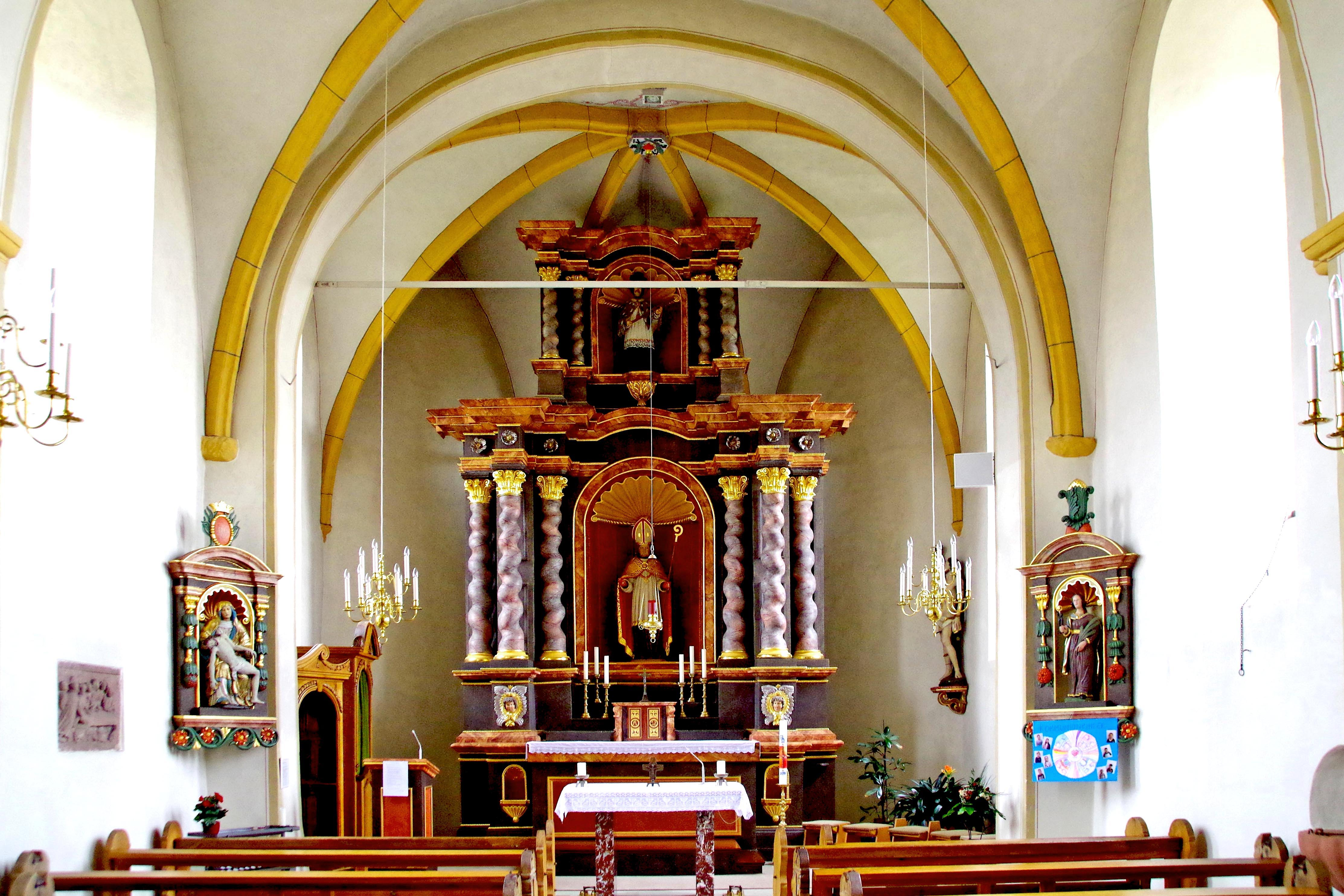 St. Willibrord (Weinsheim), barocker Innenraum von 1706